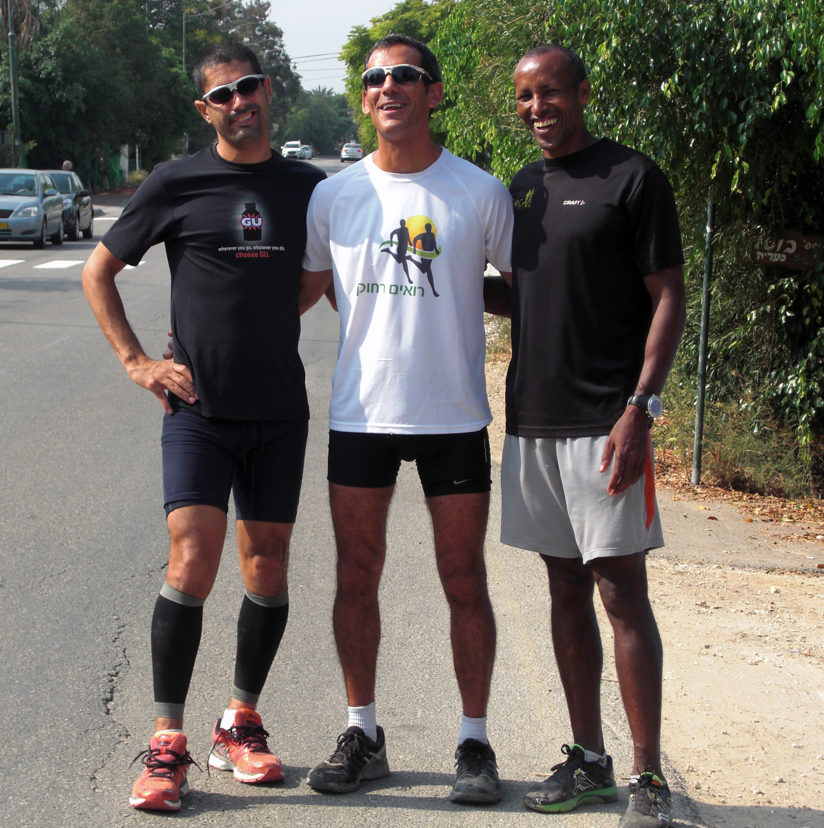 גדי ירקוני והמלווה חי פרחי והמאמן גזצ'ו יוסף